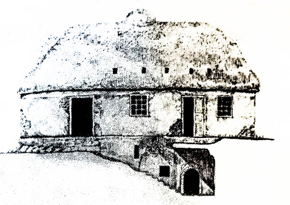 Gəncə şəhərindəki Ə. Hüseynzadə küçəsi 51 ünvanındakı günbəzli evin fasadının təsviri